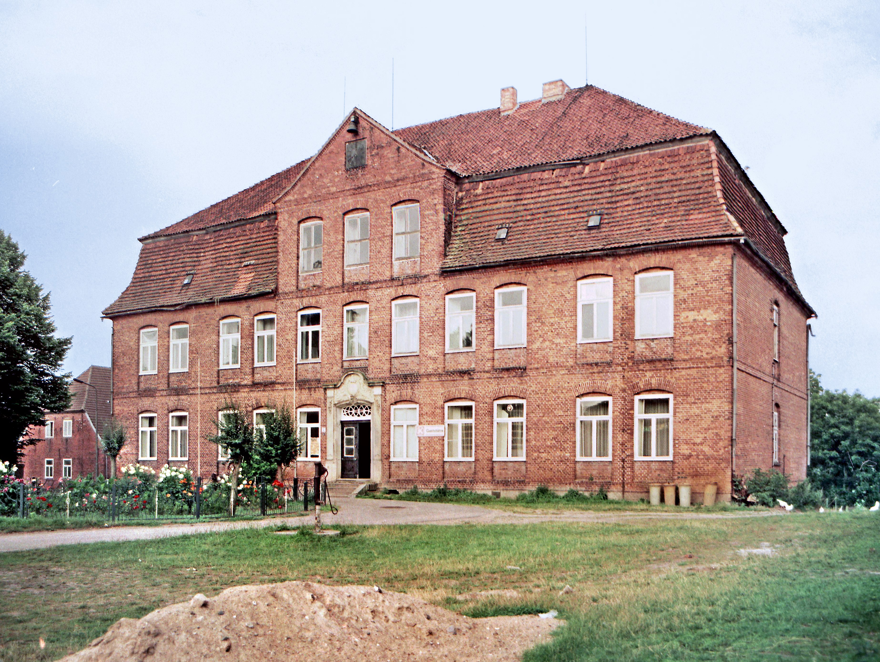 12.08.1988 2421 [23936] Plüschow: Schloß von Süden. Der Backsteinbau wurde 1763 für den Hamburger Kaufmann Phillip Heinrich von Stenglin errichtet. Seit 1954 steht das Schloß unter Denkmalschutz. 1988 wurde mit der Rekonstruktion begonnen. [R19880812A10.JPG]19880812300NR.JPG(c)Blobelt